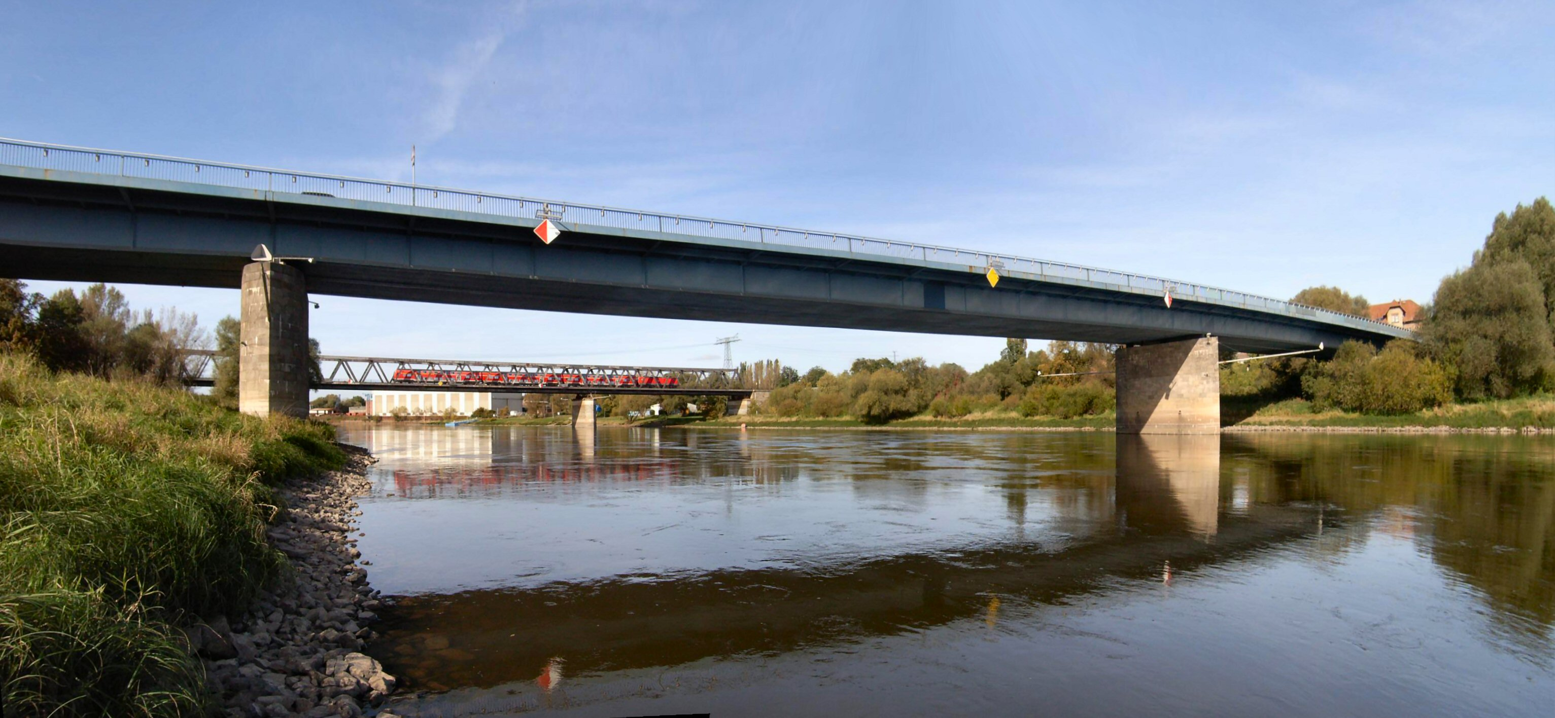 Elbebrücke Roßlau (Straße)